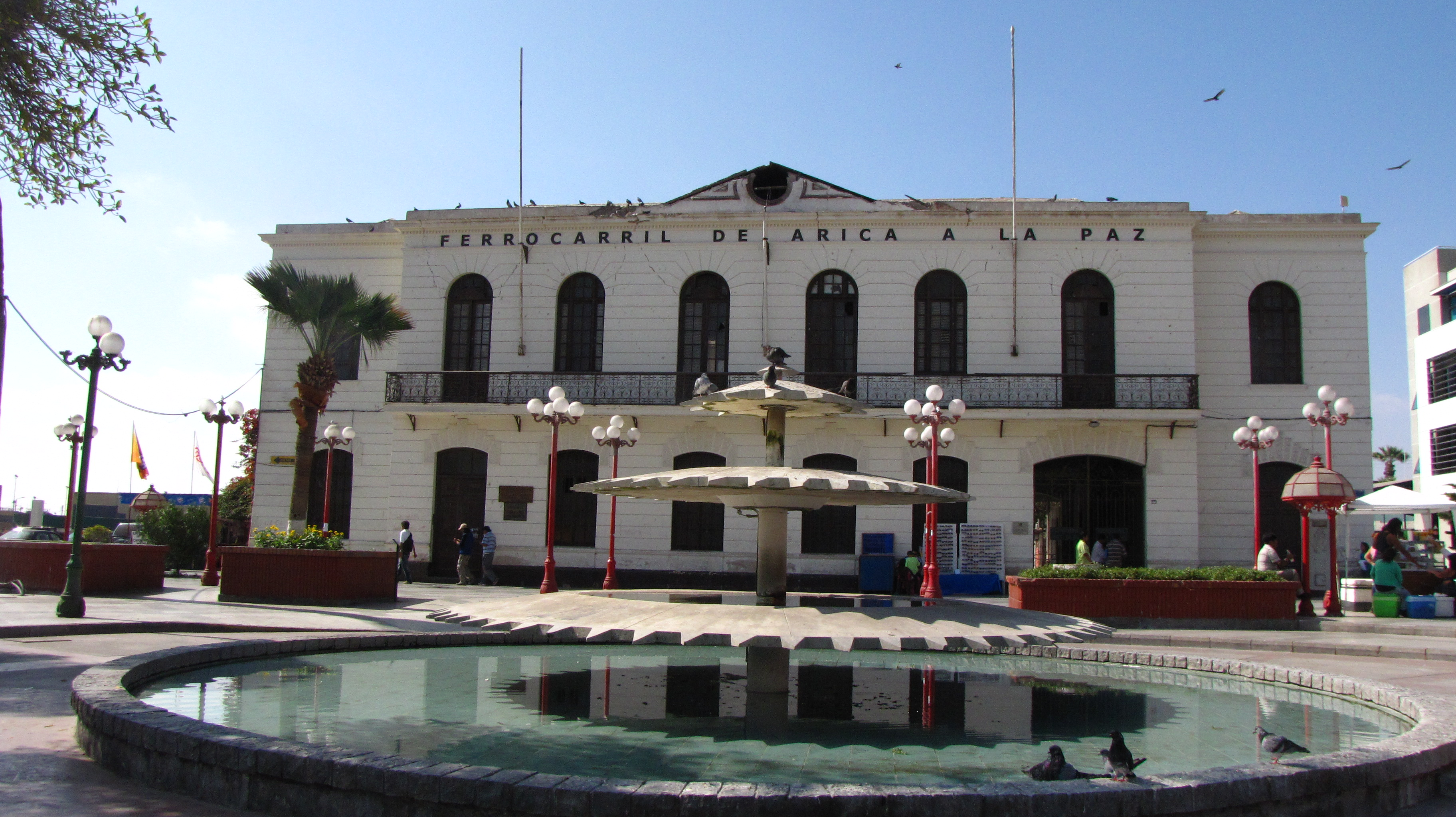 Estación de Ferrocarril Arica-La Paz y andén: Como dice el piropo: Los años no pasan por Ud. This is a photo of a national monument in Chile: 258